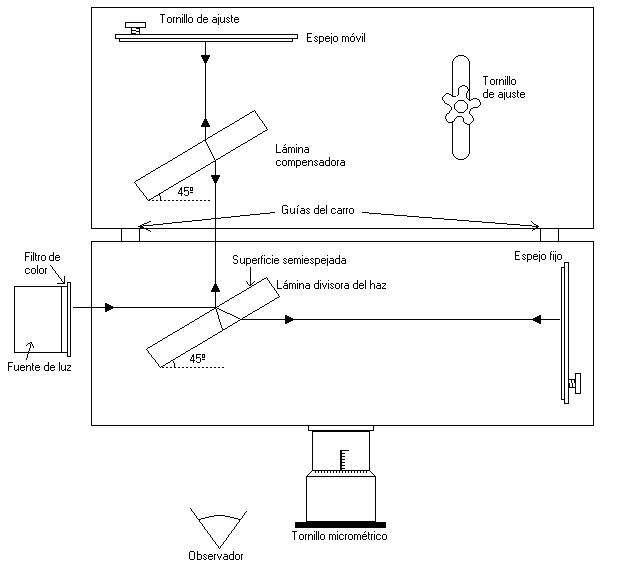 Interferómetro de Michelson (autor: Mirko Serra)